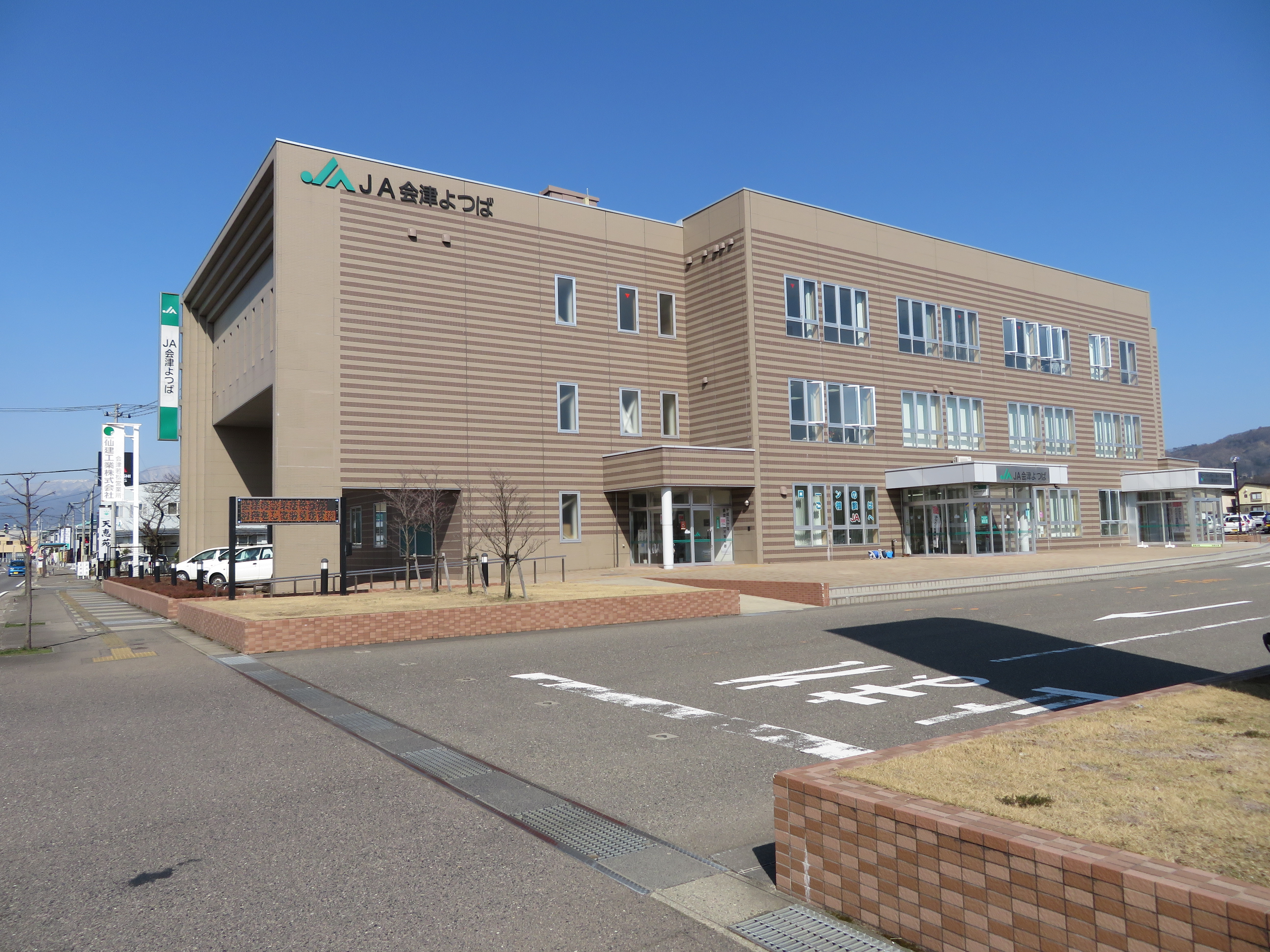 JA会津よつば 本店